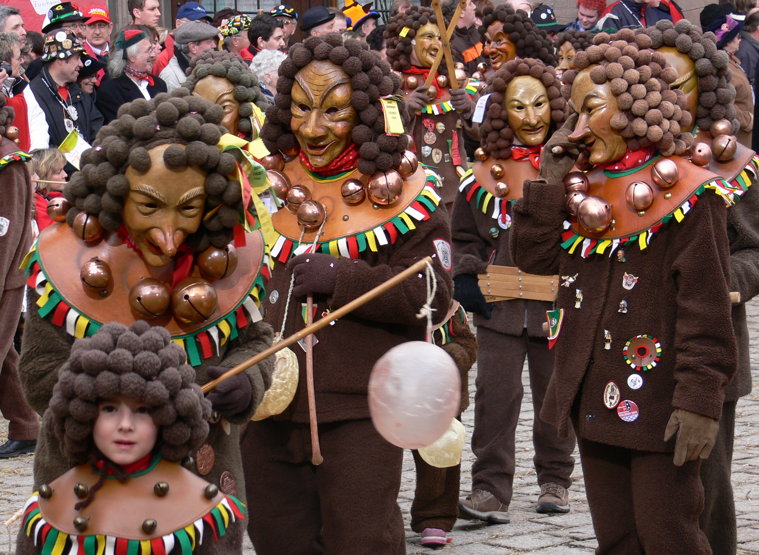 Narrenzunft Gole Riedlingen, Narrenfigur: Boppele Veranstaltung: Narrensprung beim Narrentreffen Meßkirch 2006